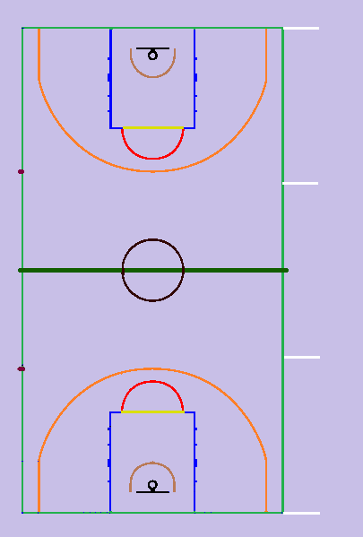 boisko do koszykówki